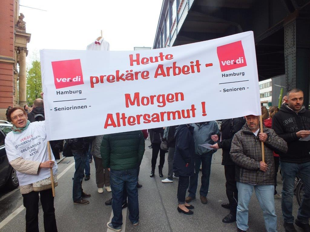 ver.di-Seniorinnen und Senioren